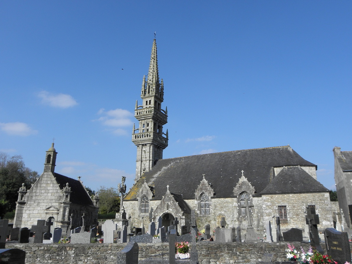 Vue méridionale de l'ossuaire et de l'église de Saint-Servais (29).